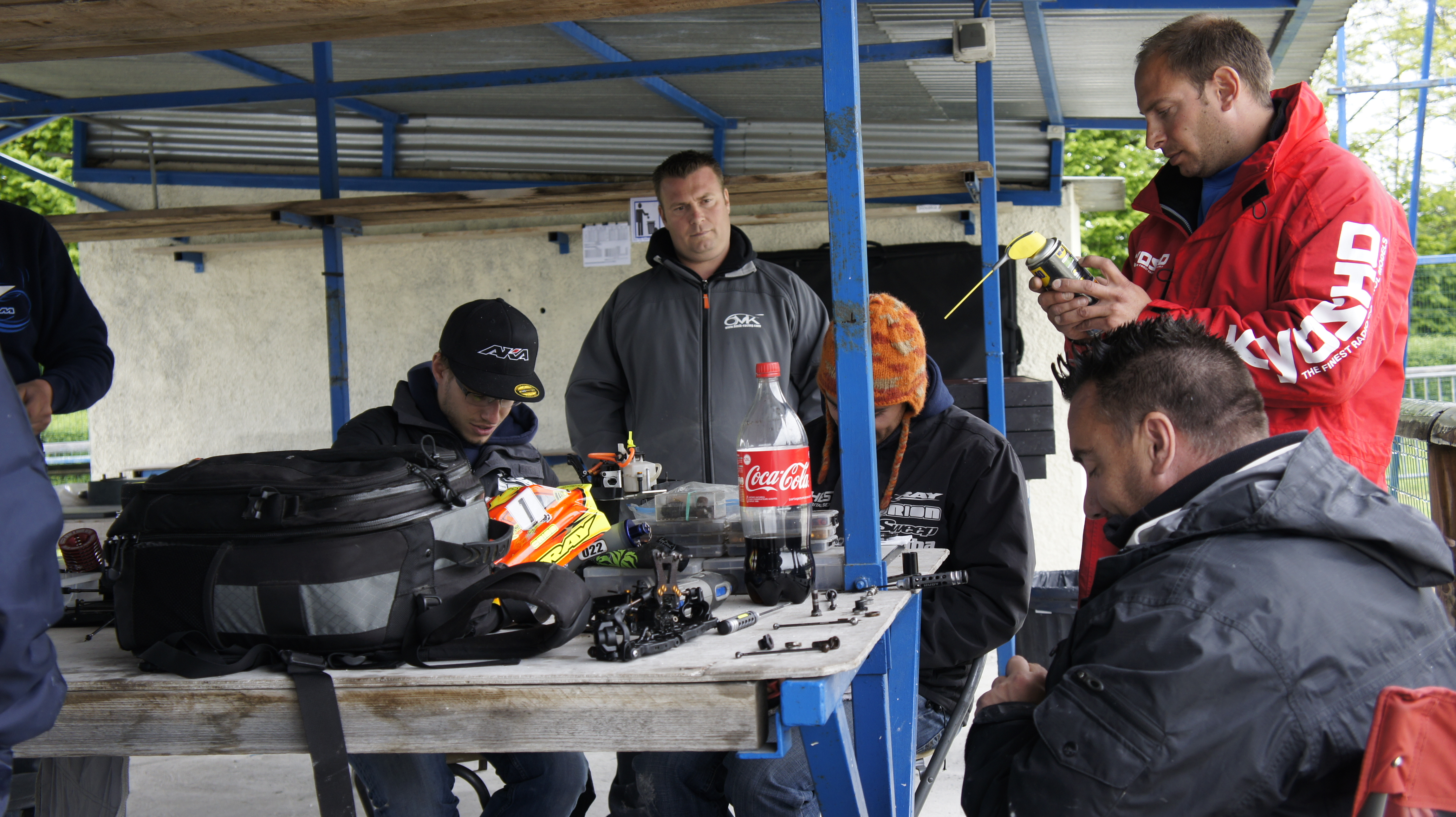 2e GP EFRA de Reims, en mai 2013 ; la piste.